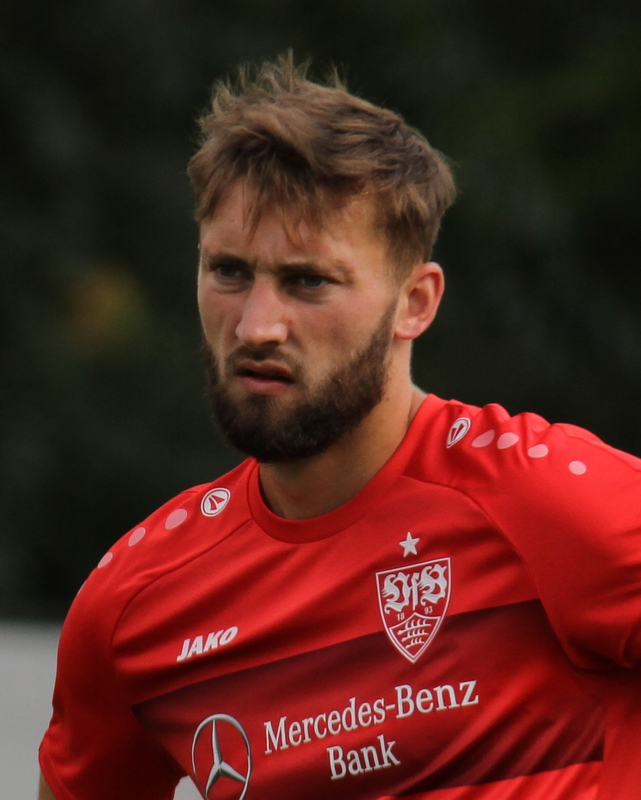 Nathaniel Phillips beim VfB-Training 2019. Aufgenommen von